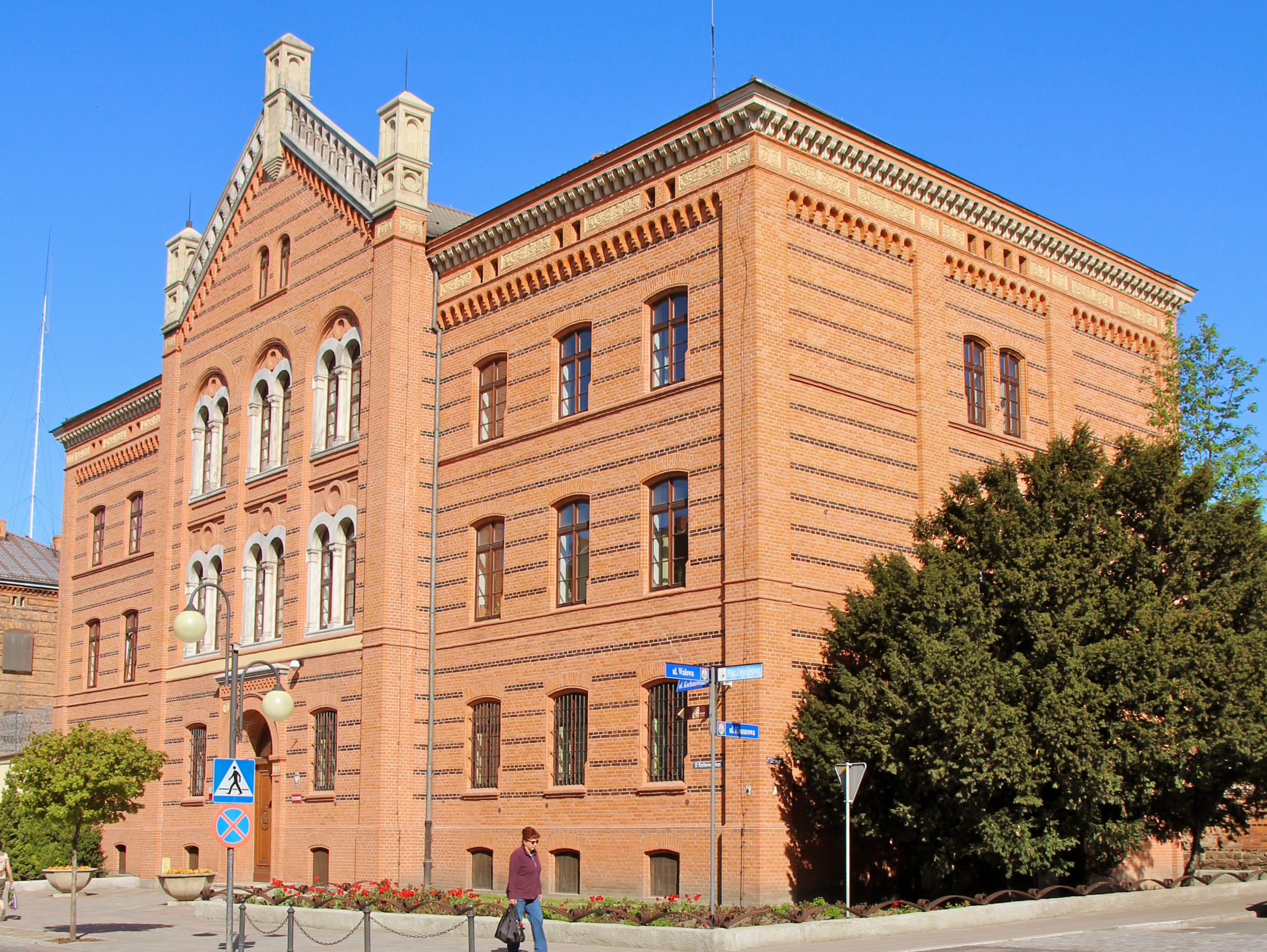 Głubczyce - miasto w Polsce położona w województwie opolskim, w powiecie głubczyckim. ul. Kochanowskiego 1 (sąd)